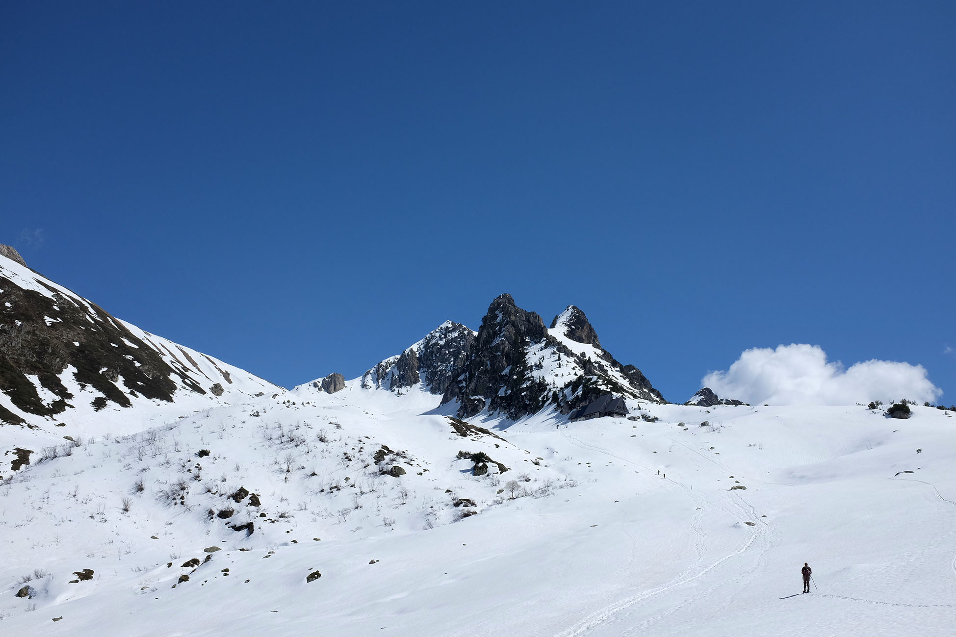 Parco naturale del Marguareis (Q1533952)